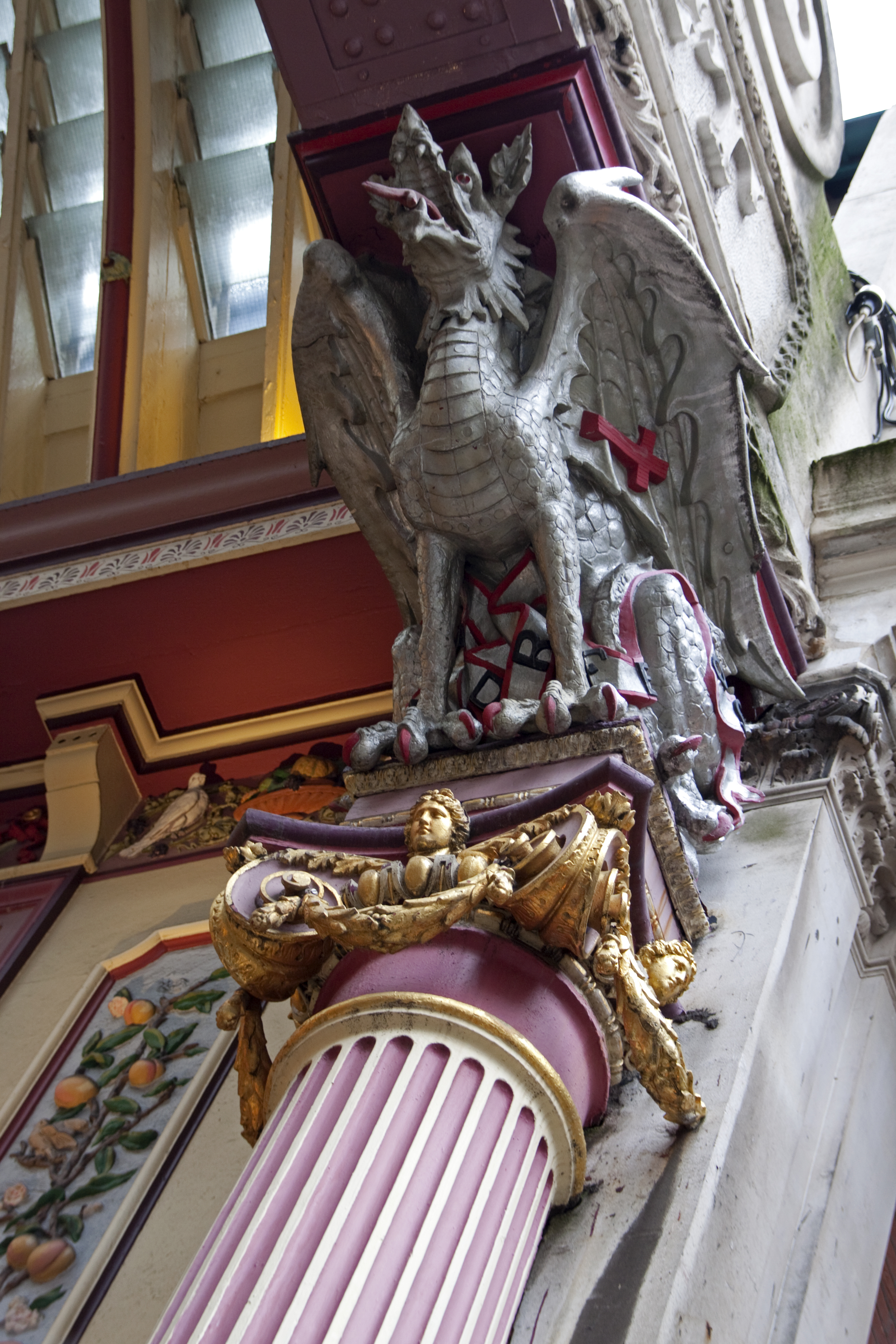 Leadenhall market Dragon